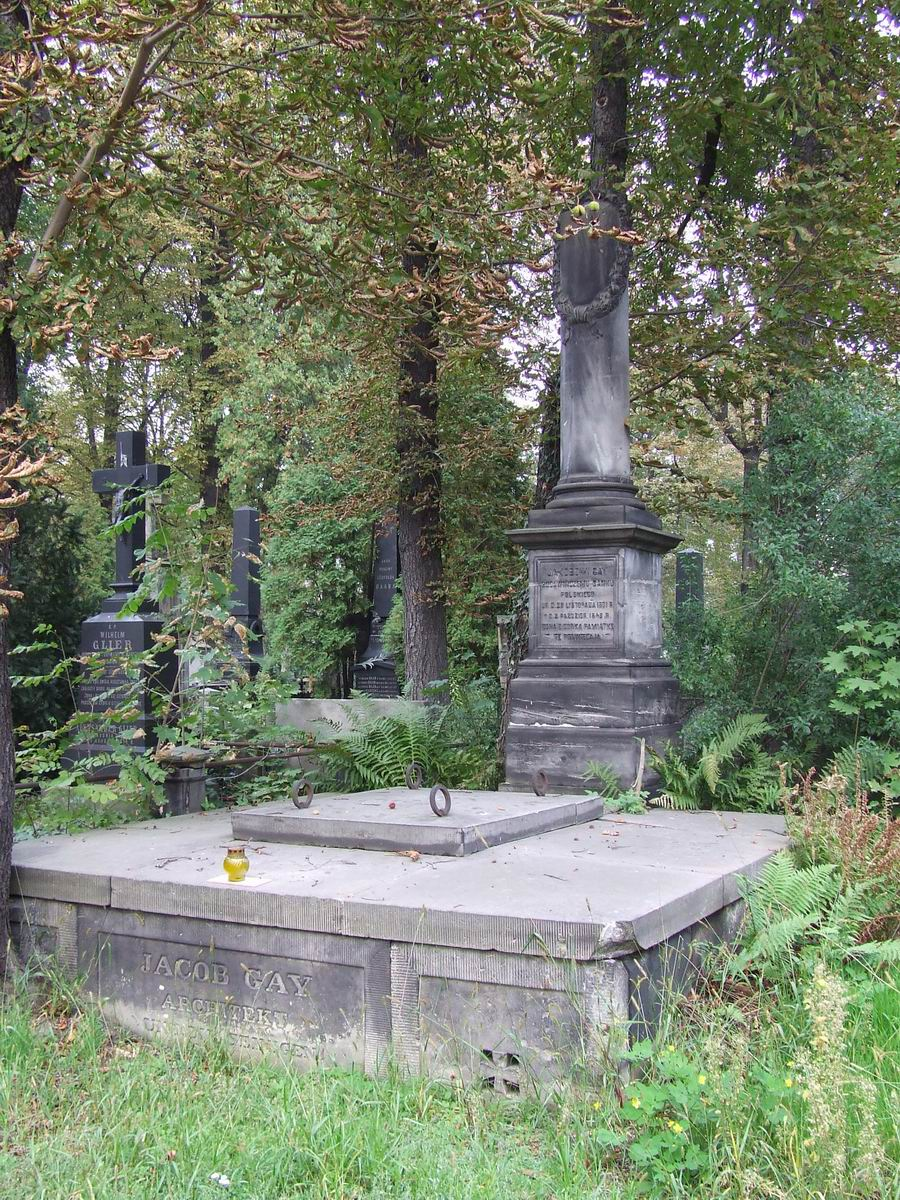 Jakub Gay, grób, Cmentarz Ewangelicko-Augsburski w Warszawie